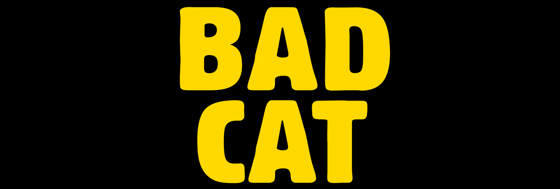 Logotipo vectorial de la película animada Bad Cat (2016).